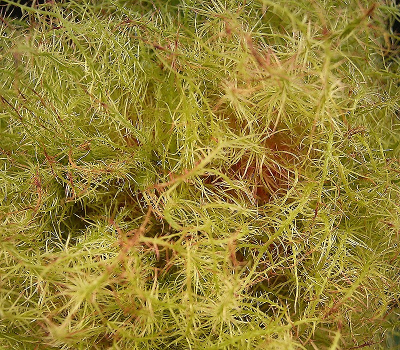 Diplolepis rosae on Rosa canina